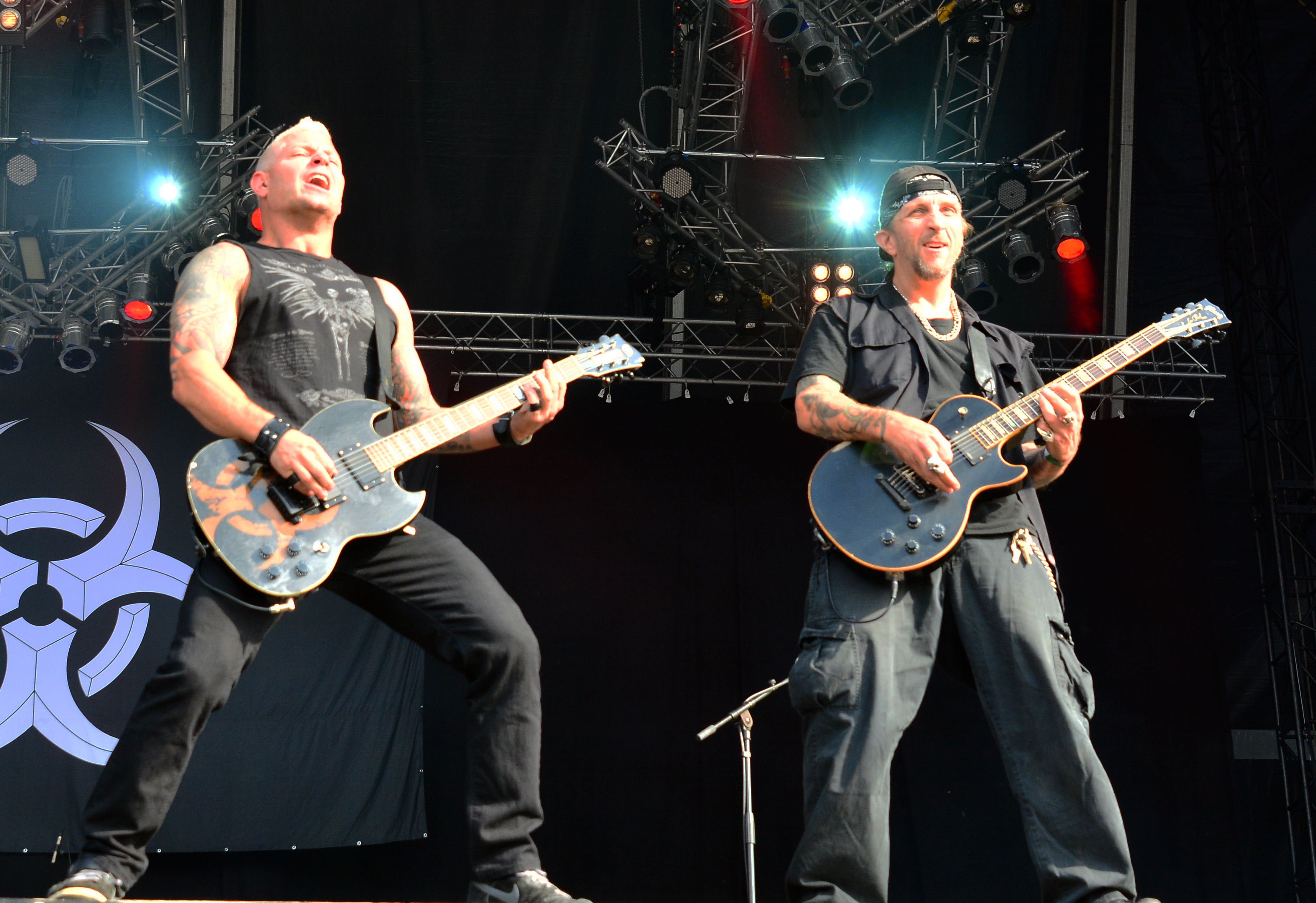 Biohazard beim Wacken Open Air 2015